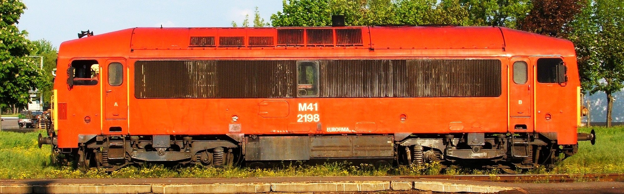 M41 mozdony oldalprofilból. (Szentes állomás)